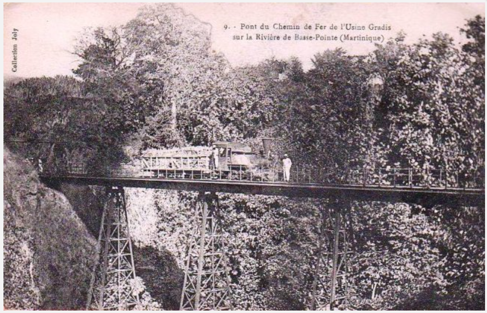 Pont du Chemin de Fer de l'Usine Gradis sur la Riviere de Basse-Pointe (Martinique)